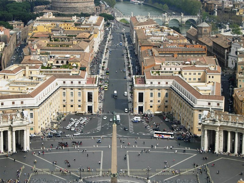 Via della Conciliazione vista dalla cupola di San Pietro.